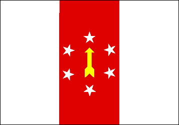 Bandeira de Vitorino